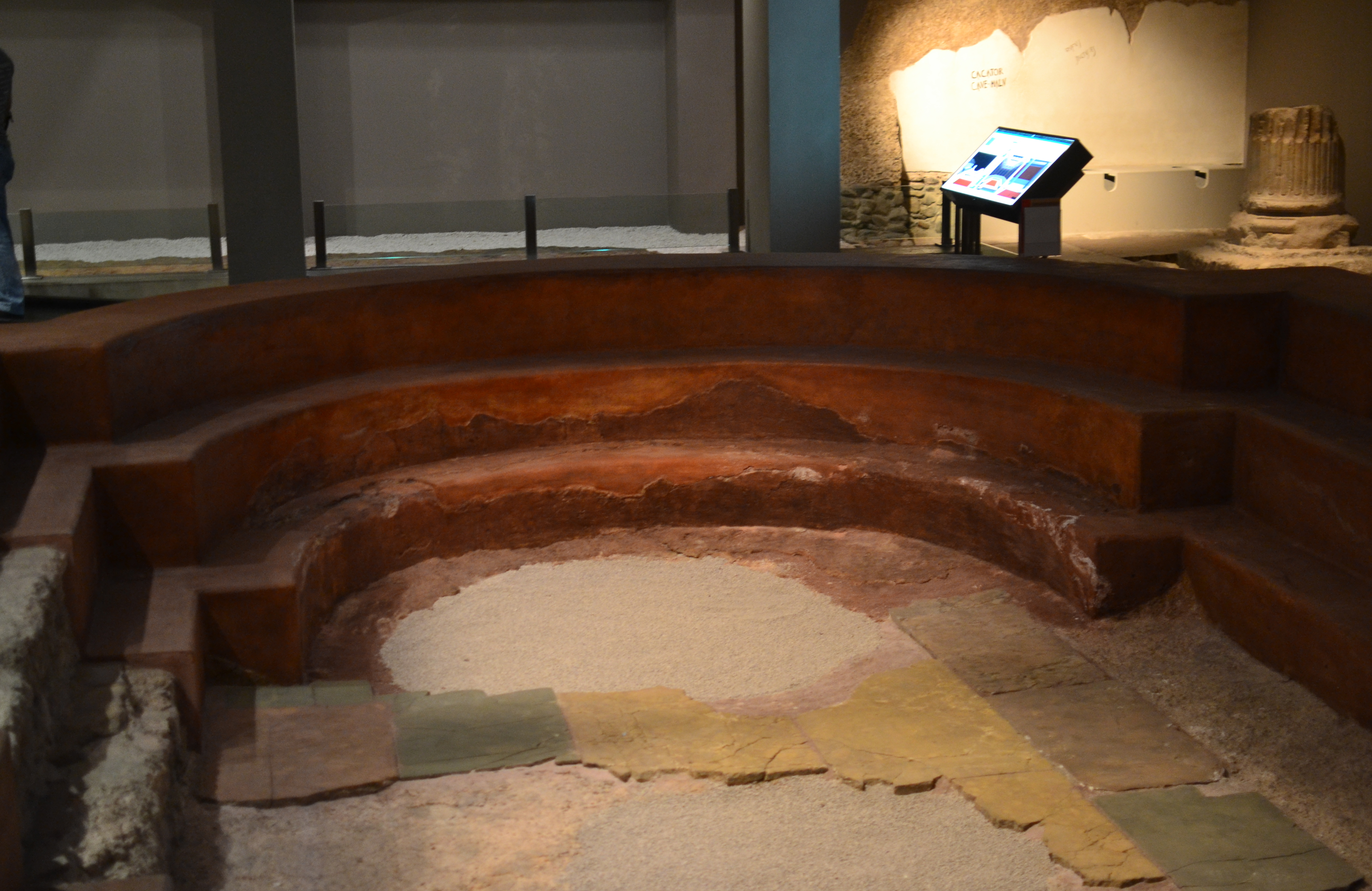 Museo de las Termas en Zaragoza.